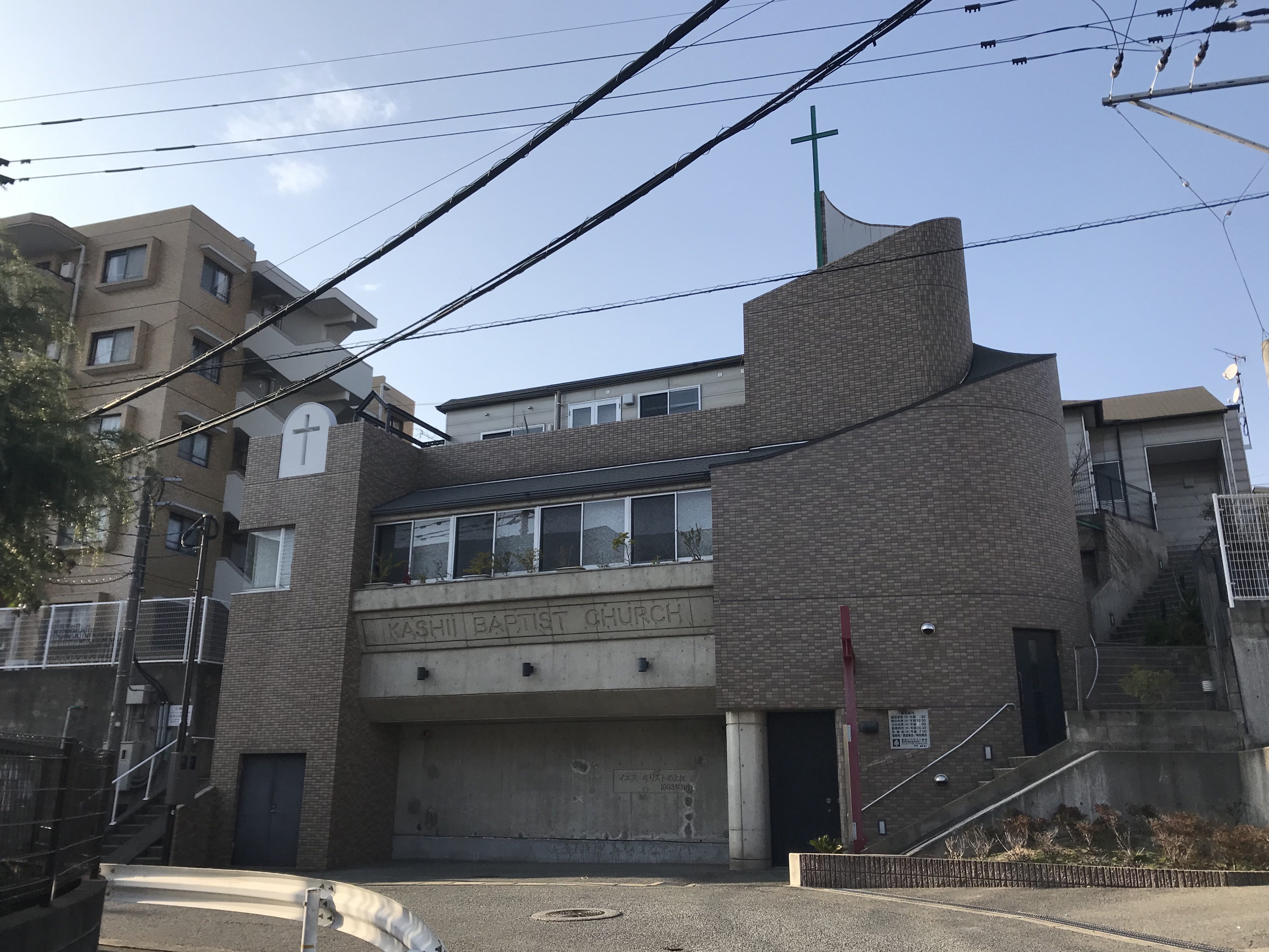 香椎バプテスト教会